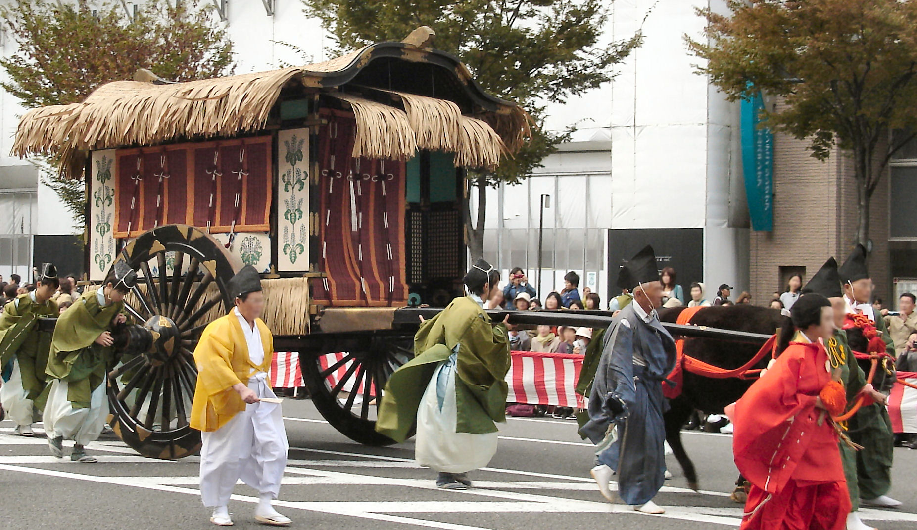 Jidai Matsuri Gissya